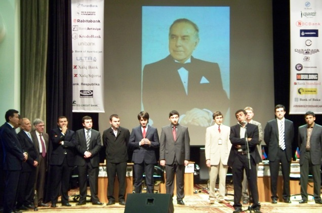 Сборные Мира и Азербайджана в Баку